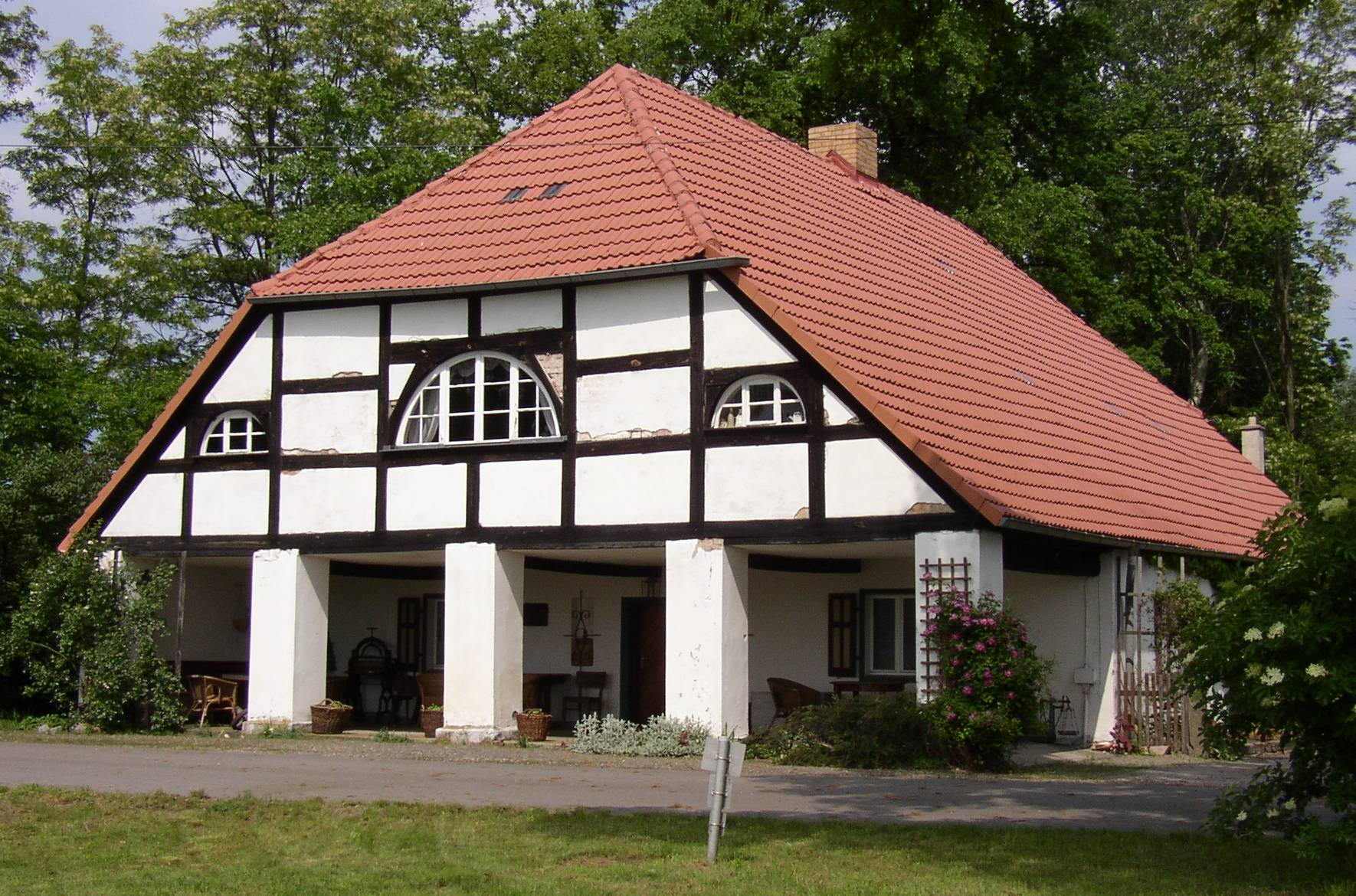 Vorlaubenhaus „Dammkrug“ in Bliesdorf-Kunersdorf in Brandenburg, Deutschland (am östl. Ortsrand an der Straße nach Neutrebbin, 1767 von Hans Sigismund von Lestwitz errichtet